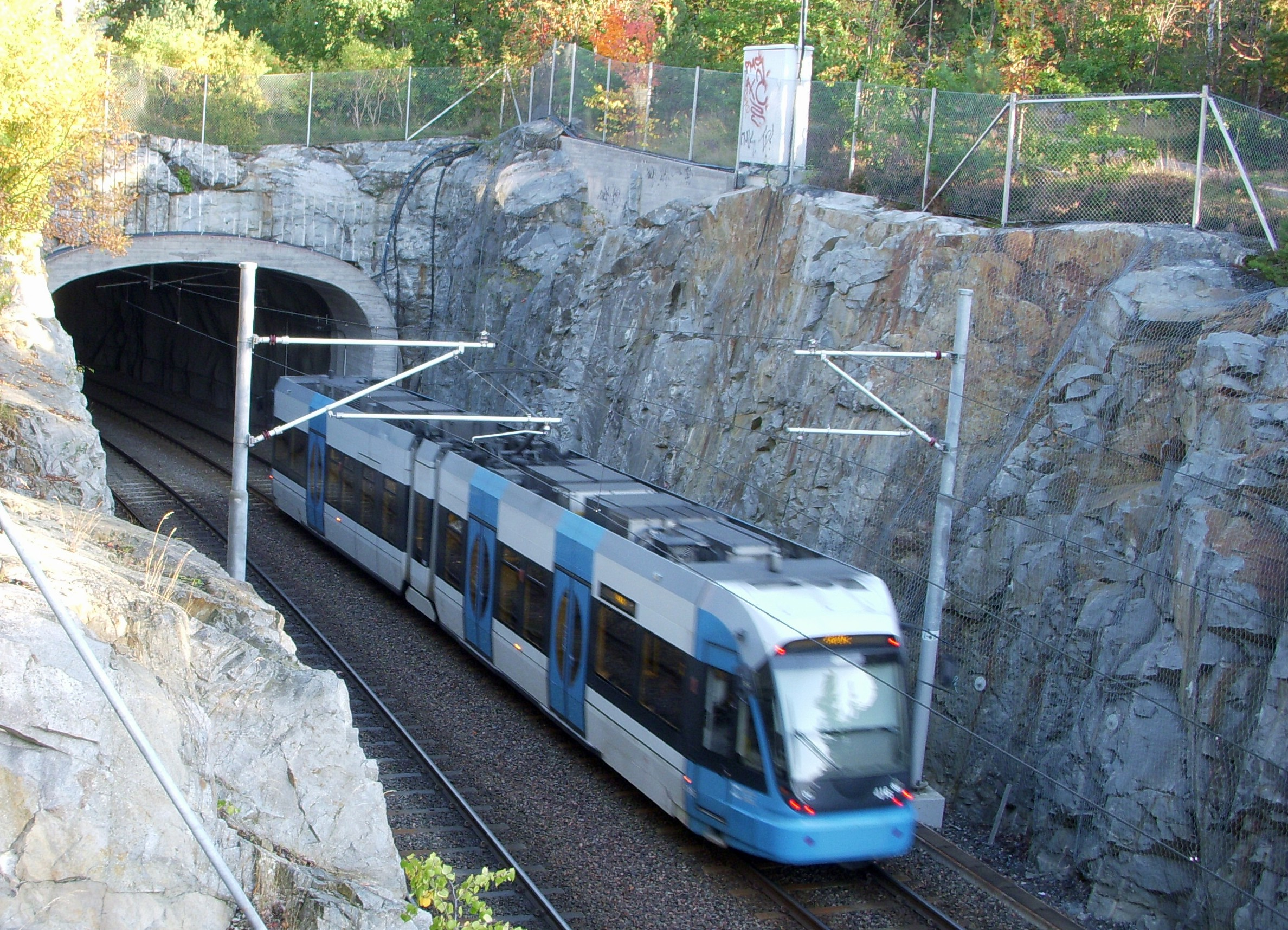 Alvikstunneln för "Tvärbanan" i Stockholm